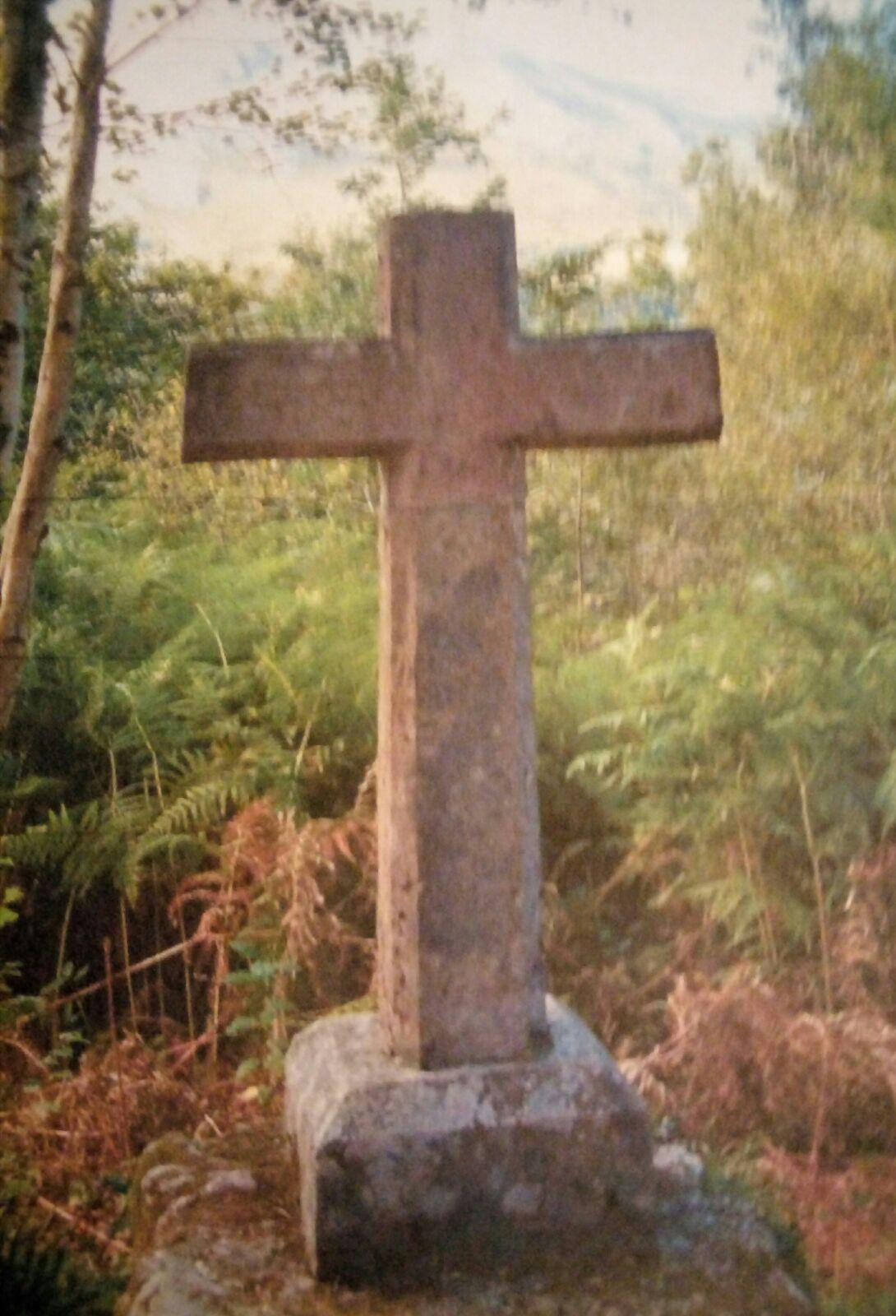 Cruz de pedra, de Souto